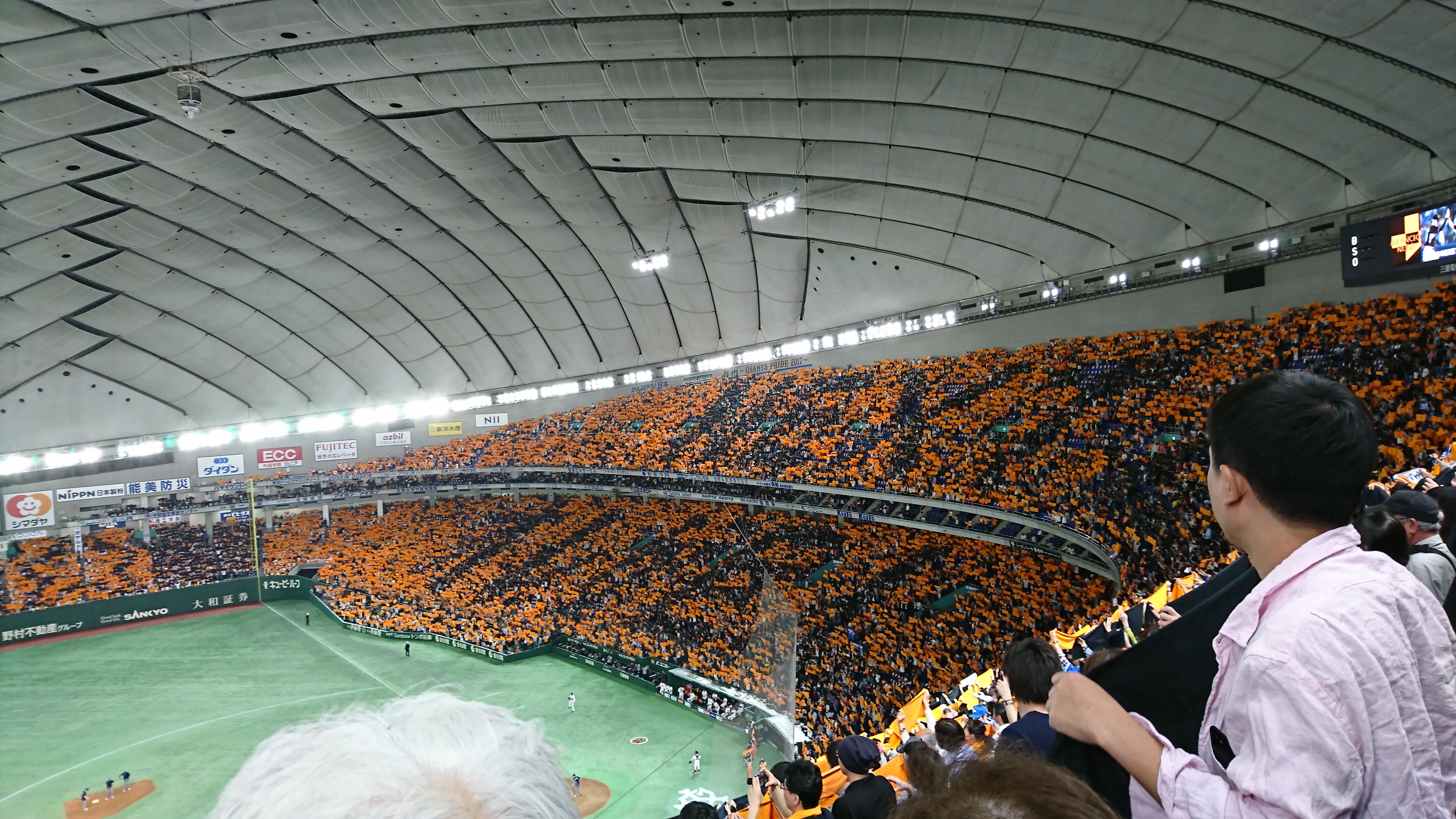 2017年5月2日の読売巨人対横浜DeNAの一戦にて行われた、アランチョ・ネロと呼ばれるマスゲーム企画。当日は観客にオレンジ色もしくは黒色のタオルが無料配布されており、それを掲げた際の様子。